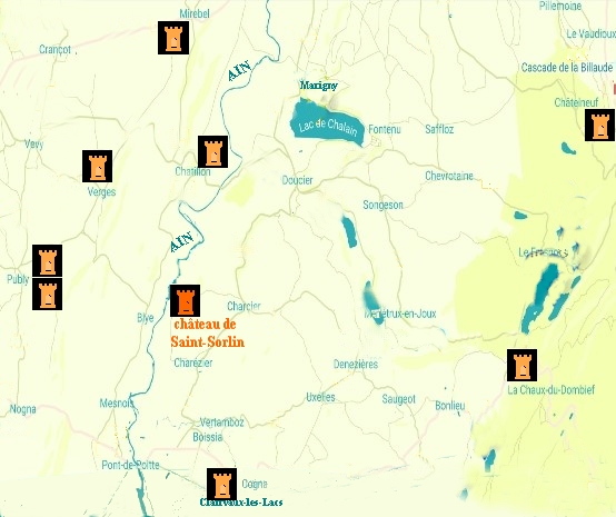 Carte Châteaux-forts - secteur mont Saint-Sorlin, Charézier, Jura (moyenne vallée de l'Ain)